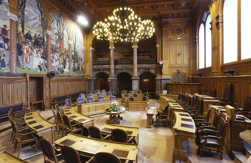 Saal des Ständerats im Bundeshaus in Bern (Parlamentsgebäude)